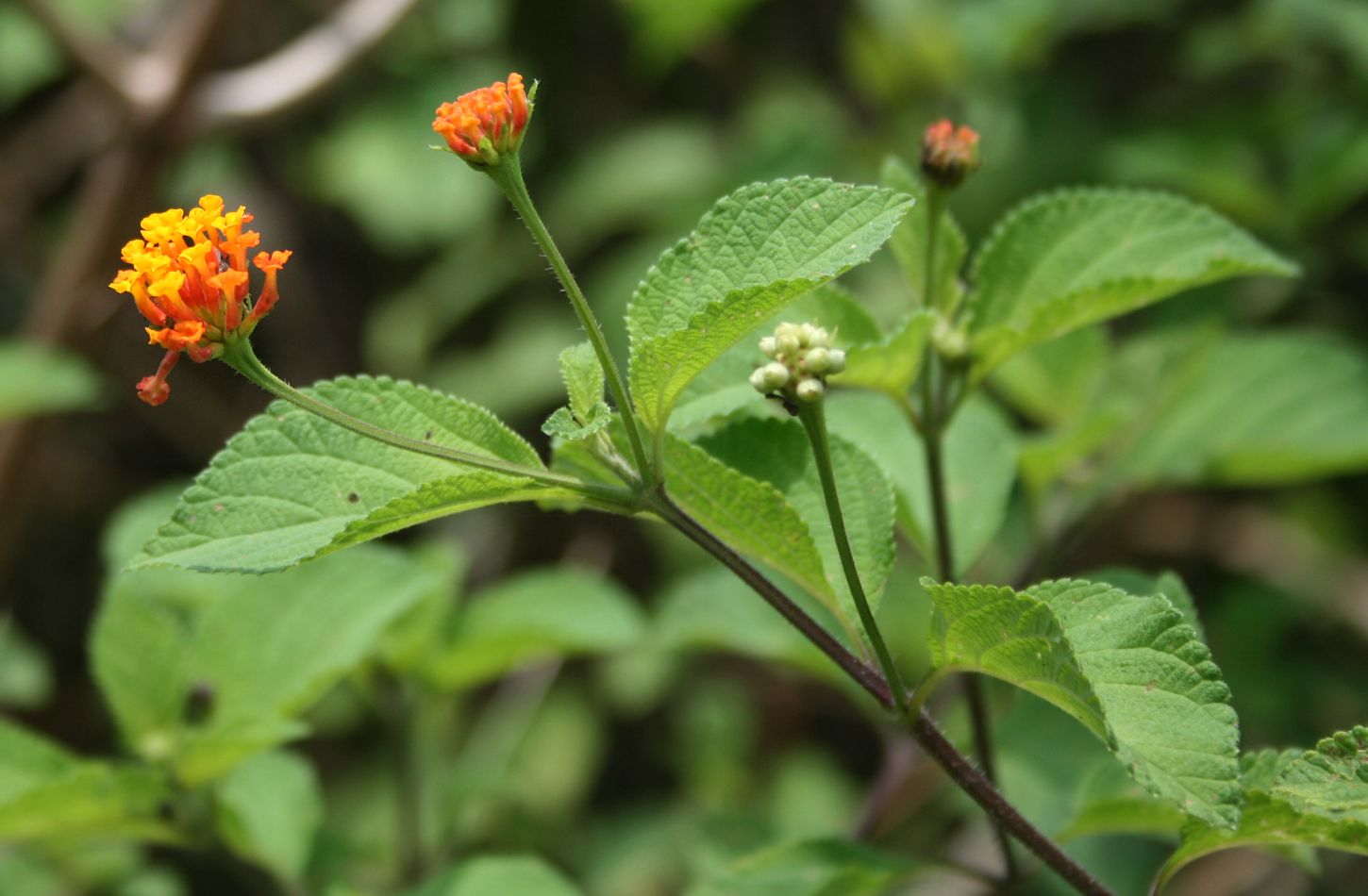 Lantana camara, Eisenkrautgewächse (Verbenaceae) - Costa Rica: Prov. Puntarenas, La Gamba NW Golfito, Valle Bonito